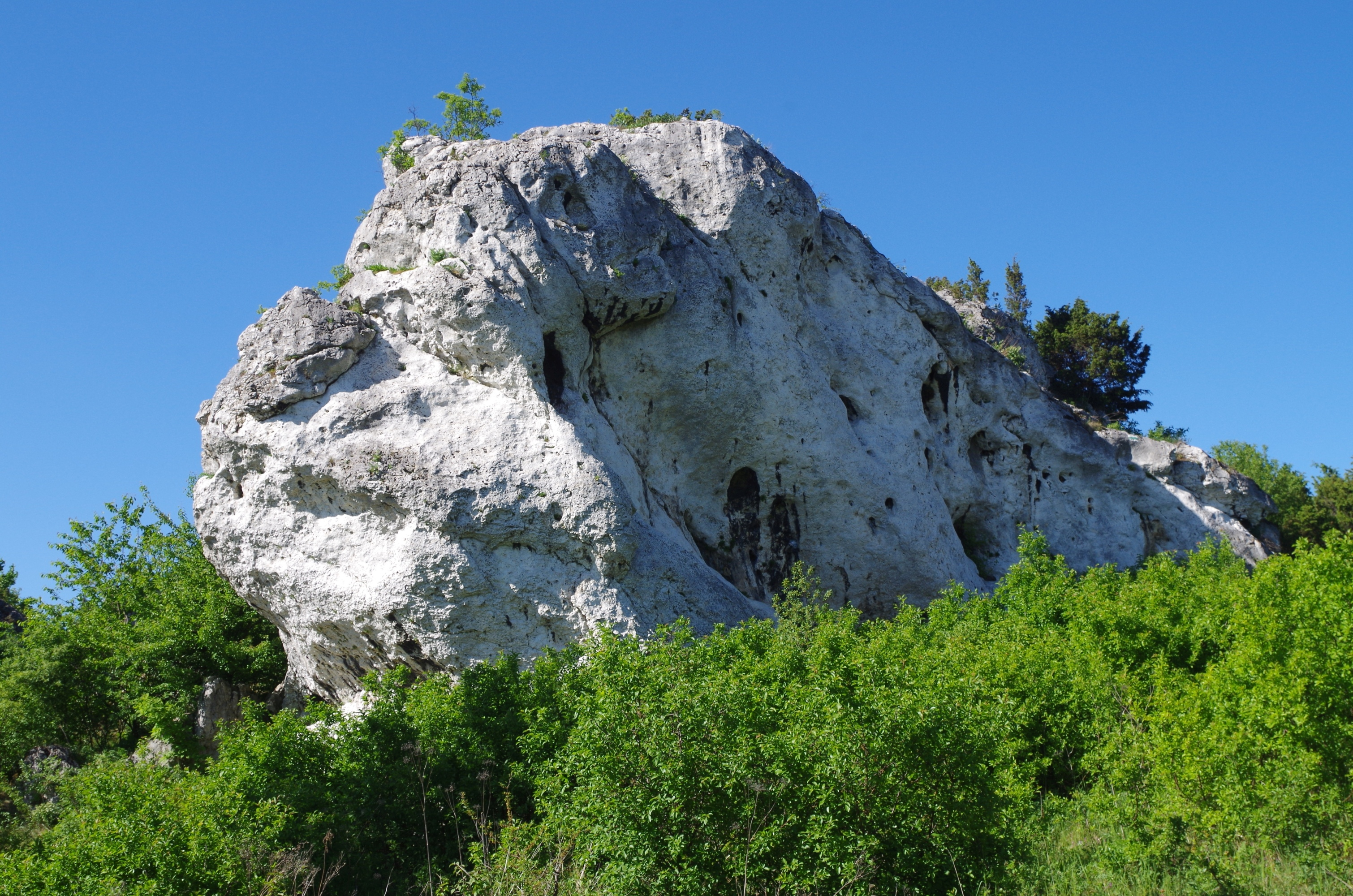 Skały Rzędkowickie. Turnia Szefa